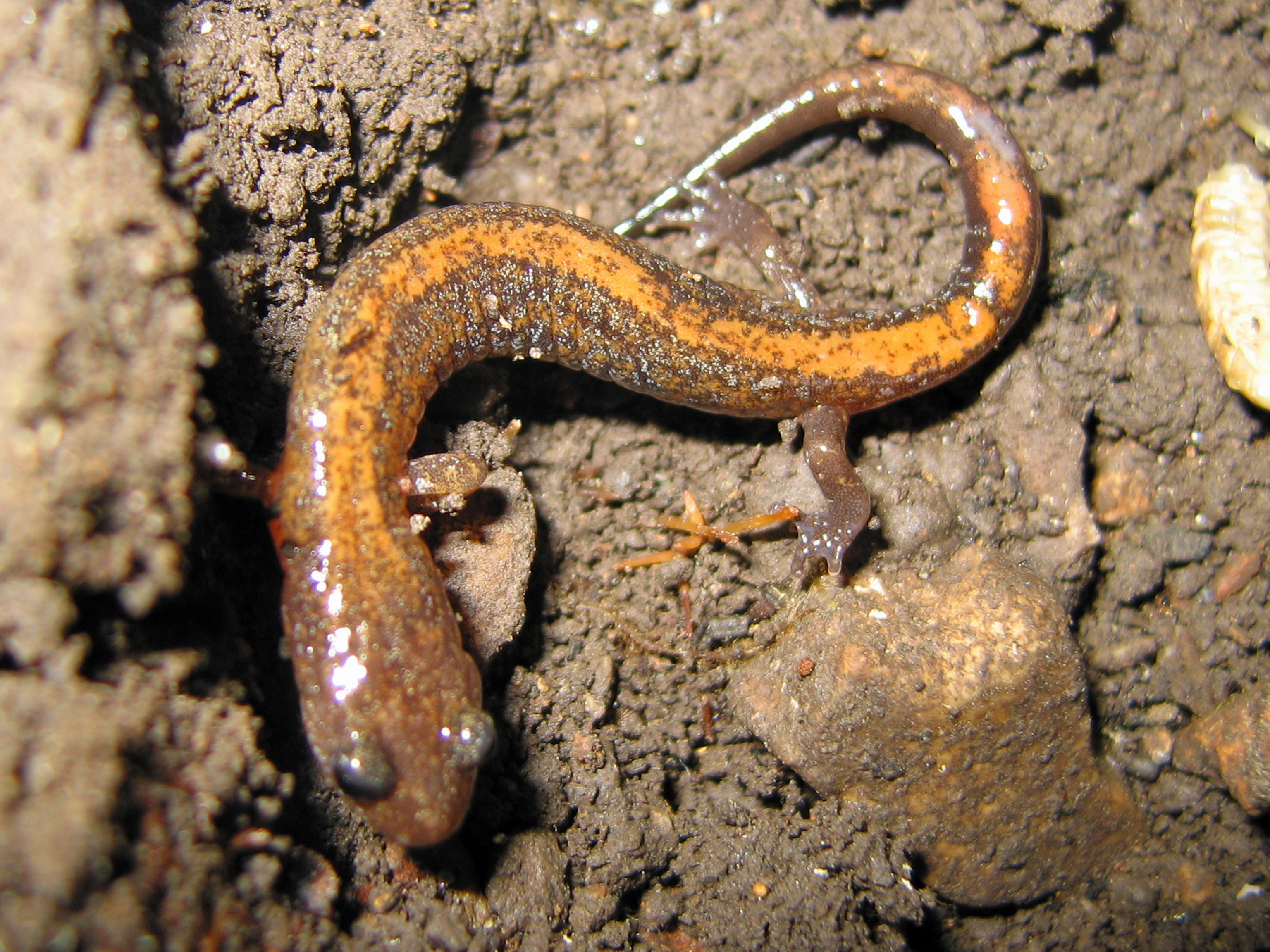 Zigzag Salamander, Plethodon dorsalis